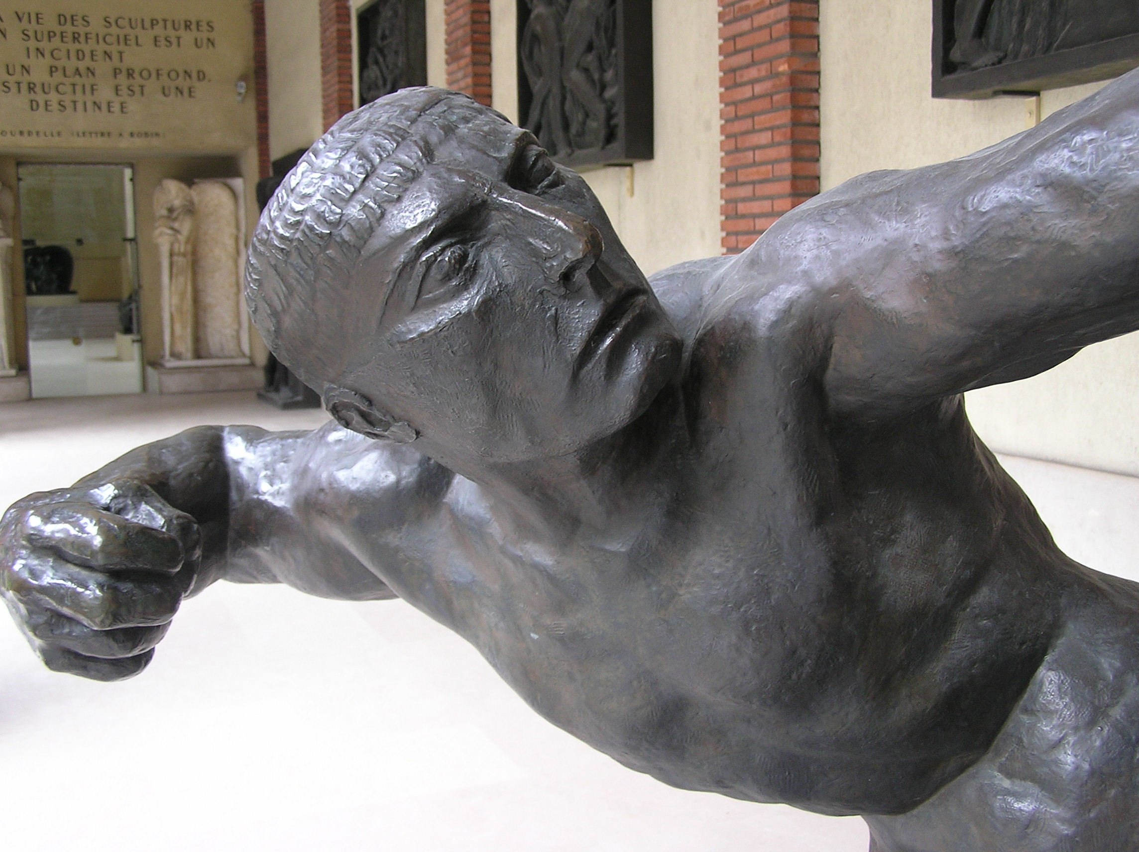 Tête d'Héracklès archer Musée Antoine Bourdelle à Paris